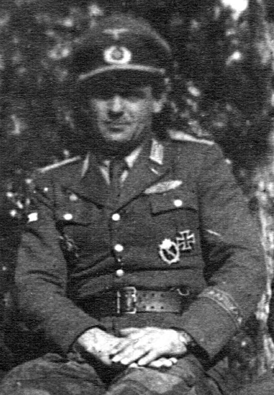 Il Capitano Hofmann (Luis Ferdinand Bisping).